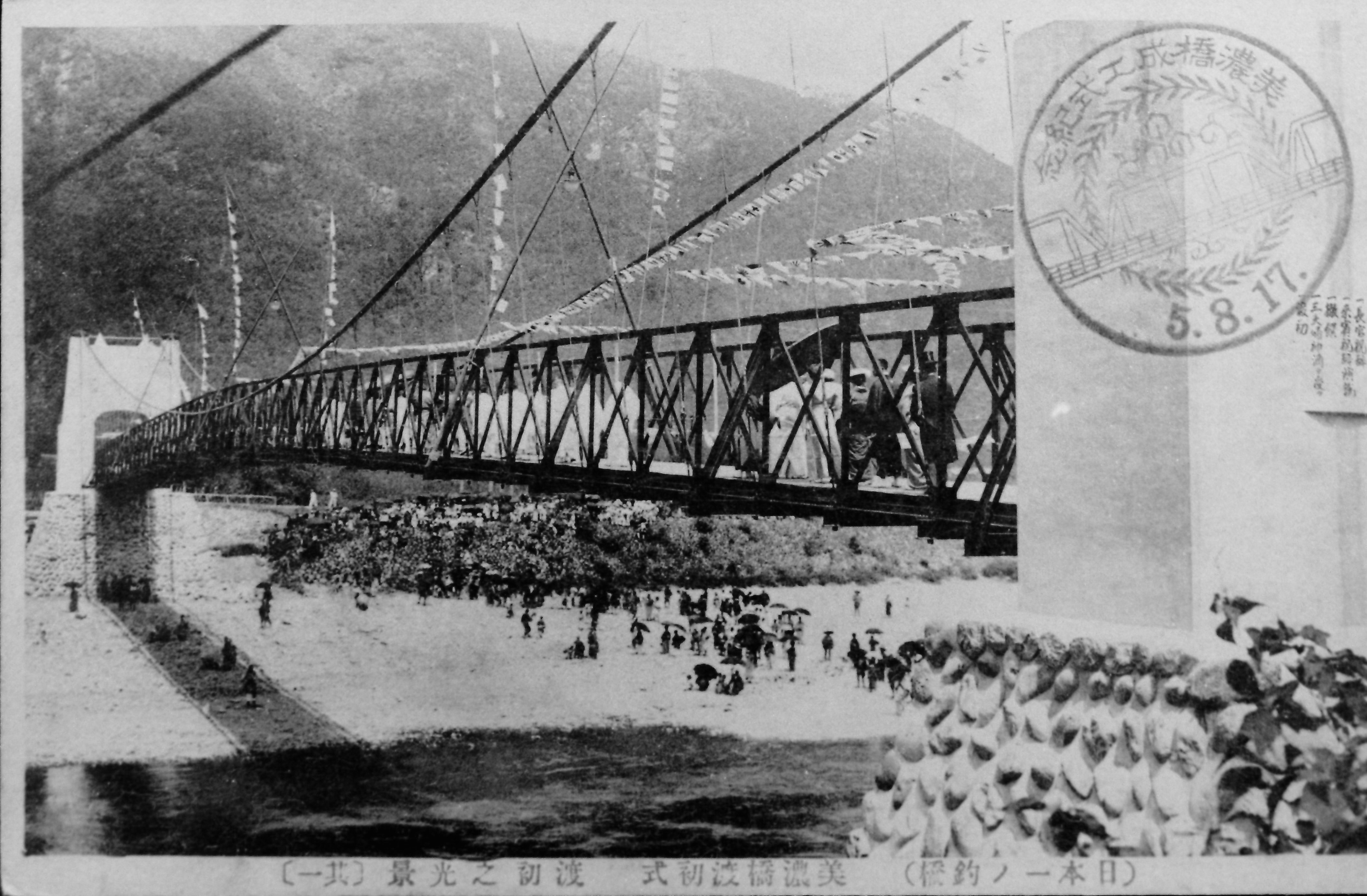 美濃橋。私も「空色」の記憶はありますが、この写真を見る限り竣工当時のトラスト部は空色ではなかったと推測されます。